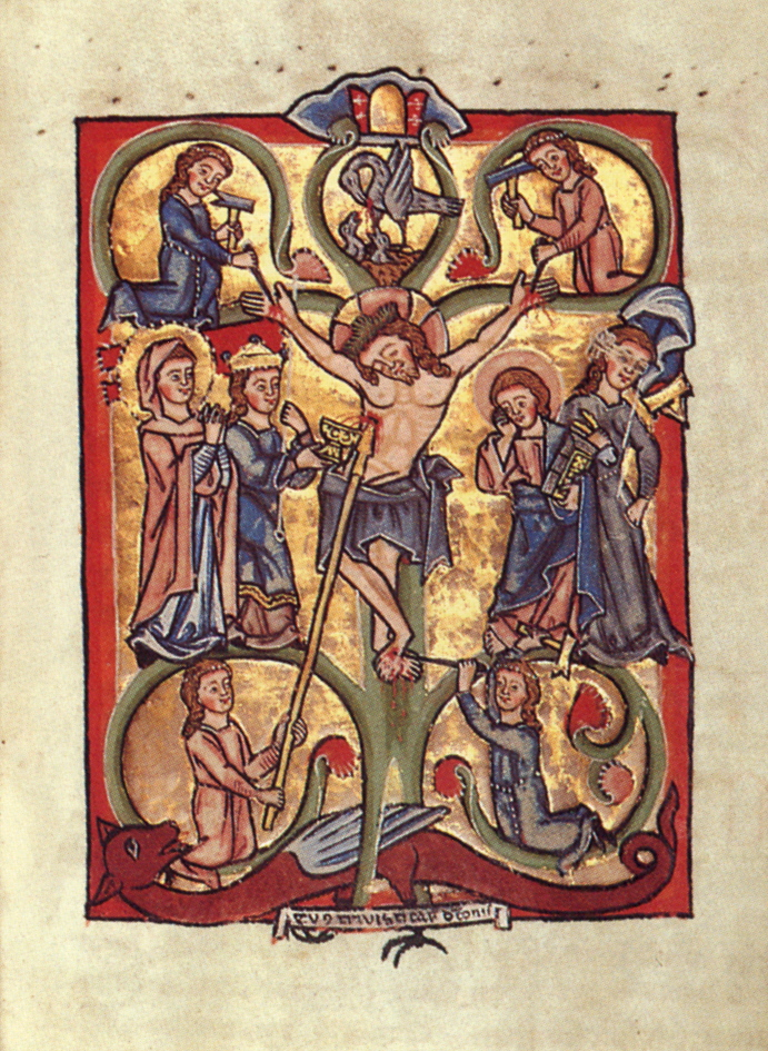 Arbor vitae (Tree of life); Kreuzigungsszene mit "Ecclesia" und MAria, Johannes und "Synagoge", in den Eckmedaillons die Tugenden: Gehorsam, Geduld, Demut, Liebe; Miniatur aus dem Scherenberg-Psalter, Pergamenthandscrift, 158 Blätter, 18,5 x 13 cm; Straßburg, c. 1260 Badische Landesbibliothek, Cod. St. Peter perg. 139, Blatt 8r